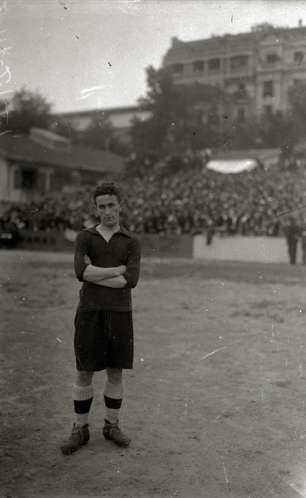 ESCENAS DE LA FINAL DE CAMPEONATO DE ESPAÑA EN EL CAMPO DE ATOTXA ENTRE LOS EQUIPOS DEL REAL UNION Y REAL MADRID (1-0). (Foto 5/18) (Patxi Gamborena)